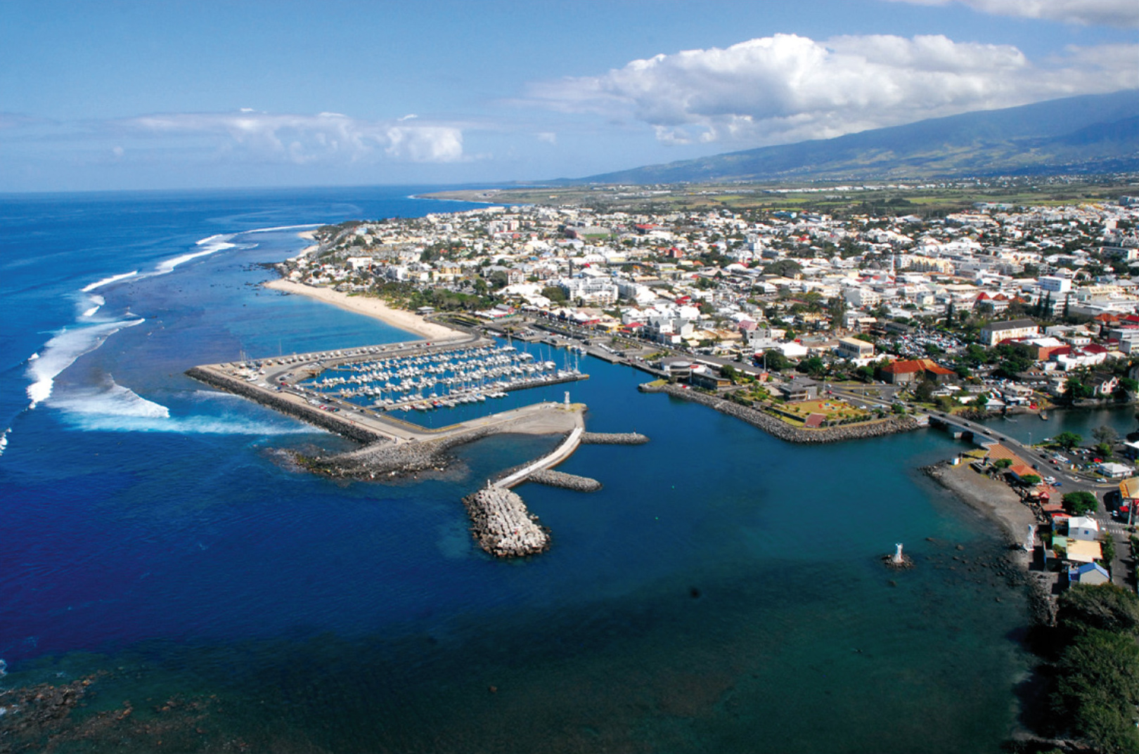 Vue d'une partie de Saint-Pierre et son port depuis un hélicoptère.